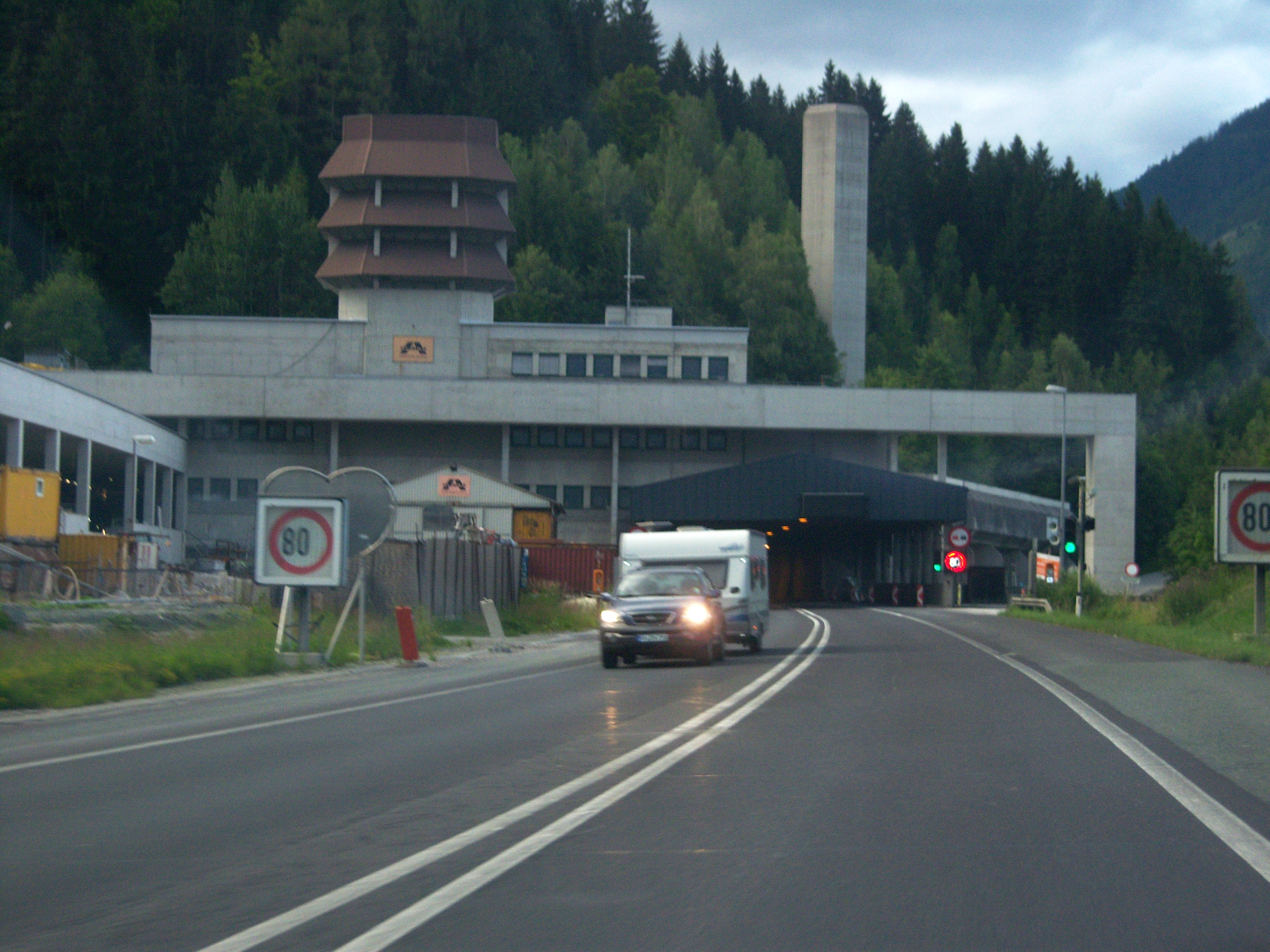 Pyhrn Autobahn A9 Richtung Voralpenkreuz vor dem Südportal des Bosrucktunnel